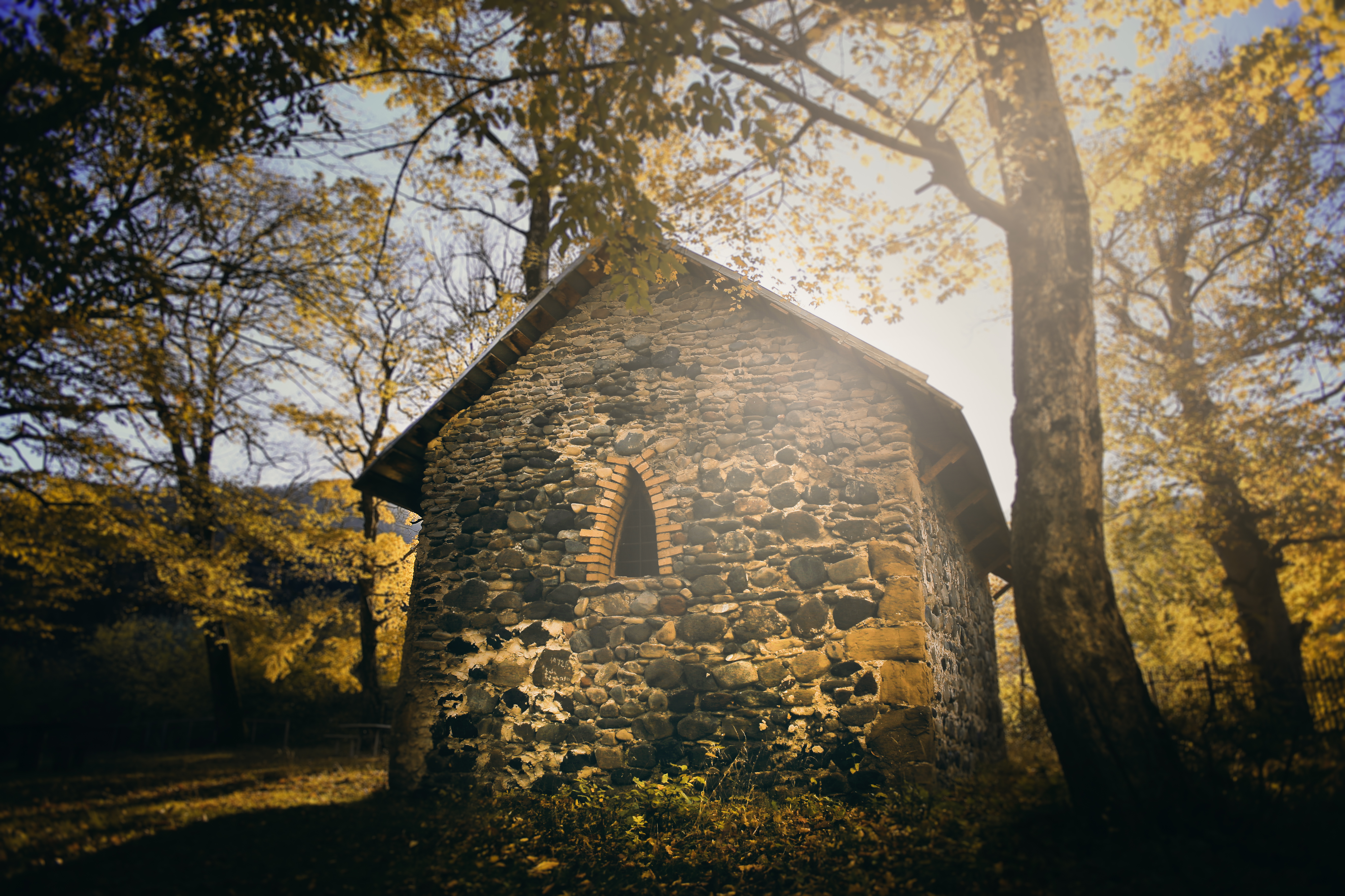 ჩიკორის ეკლესია